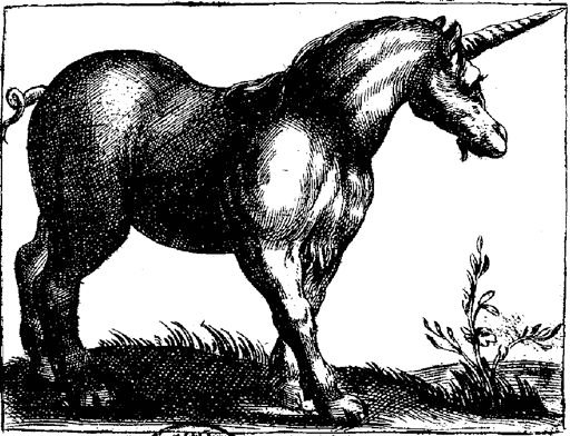 Licorne dans le Gobierno moral y politico hallao en las fieras y animales syestres, Andres de Valdecebro paru à Madrid en 1658